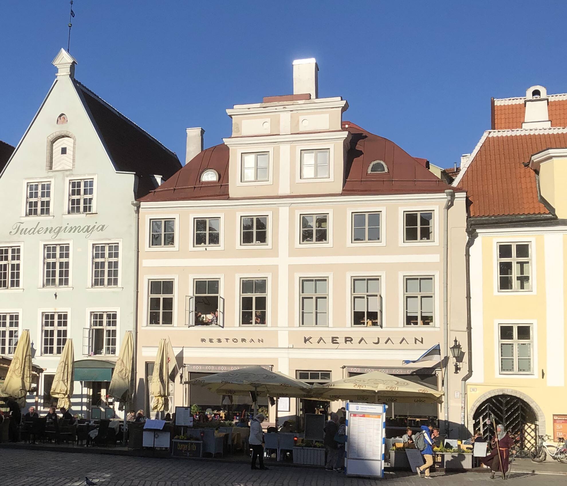 Haus Rathausplatz 17 im Jahr 2018